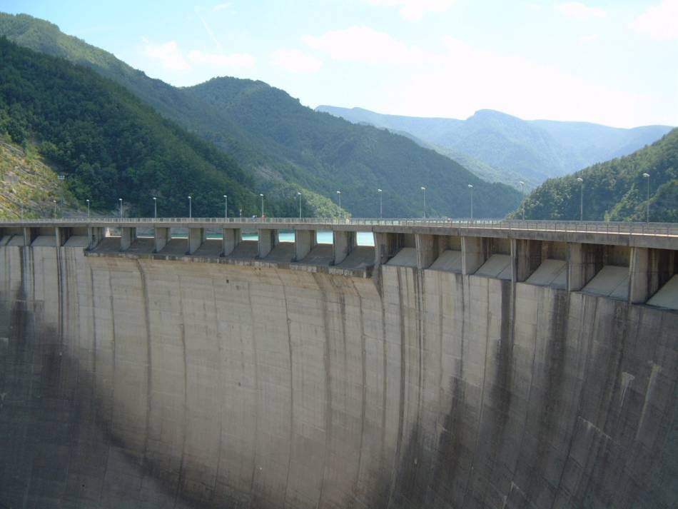 Je suis l'auteur de cette photo prise à Ridracoli en 2004